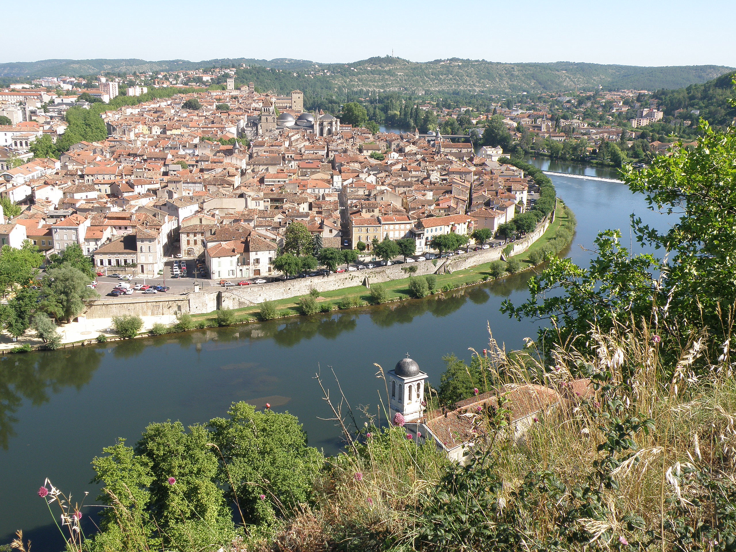 Cahors (Lot, France). Vue prise du mont Saint-Cyr, au sud et sud-est de la ville. Coup d'œil vers le nord.